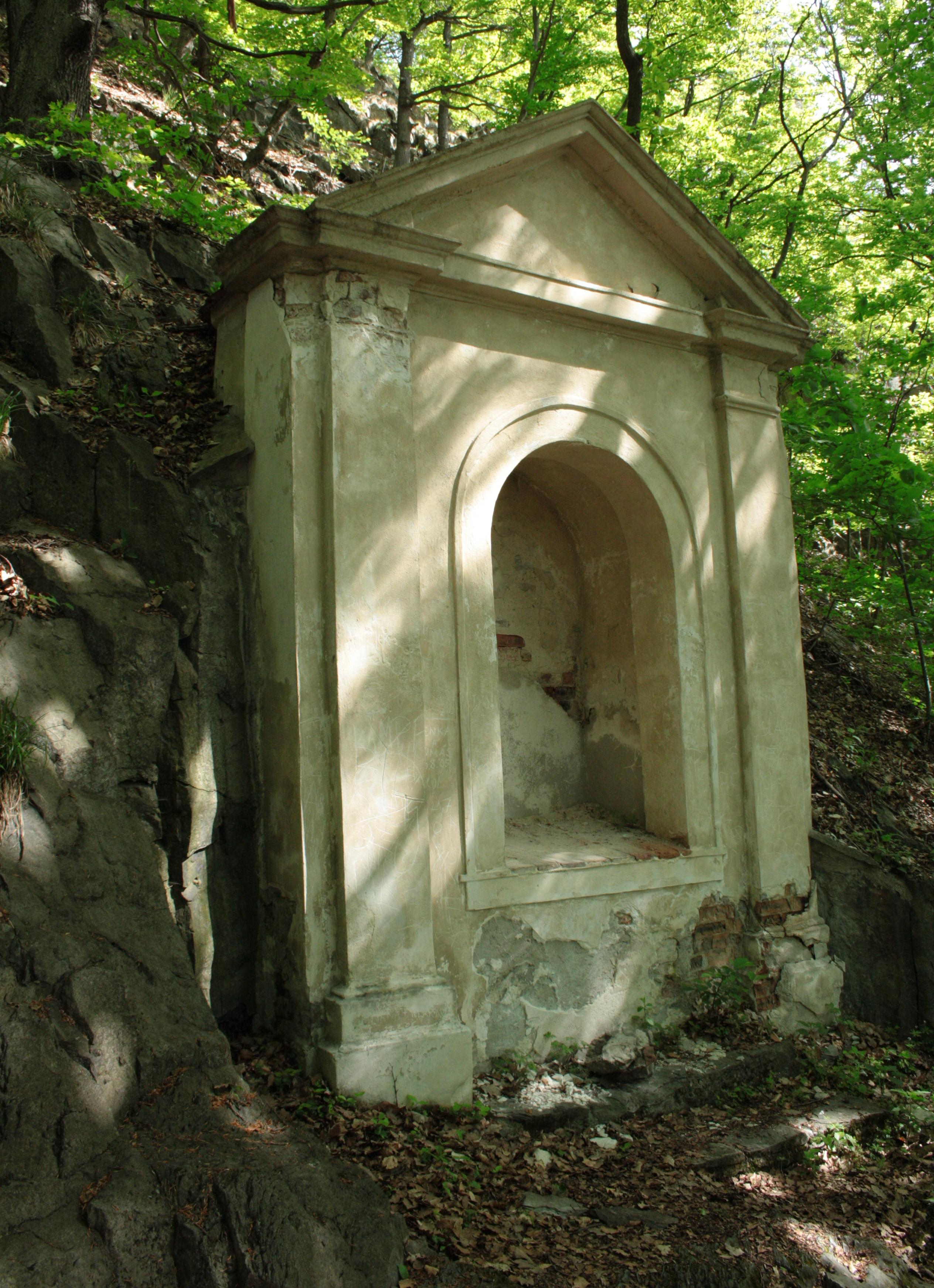 Křížová cesta na Bezděz - kaple č. 6, počítáno od spodu při cestě na vrchol.